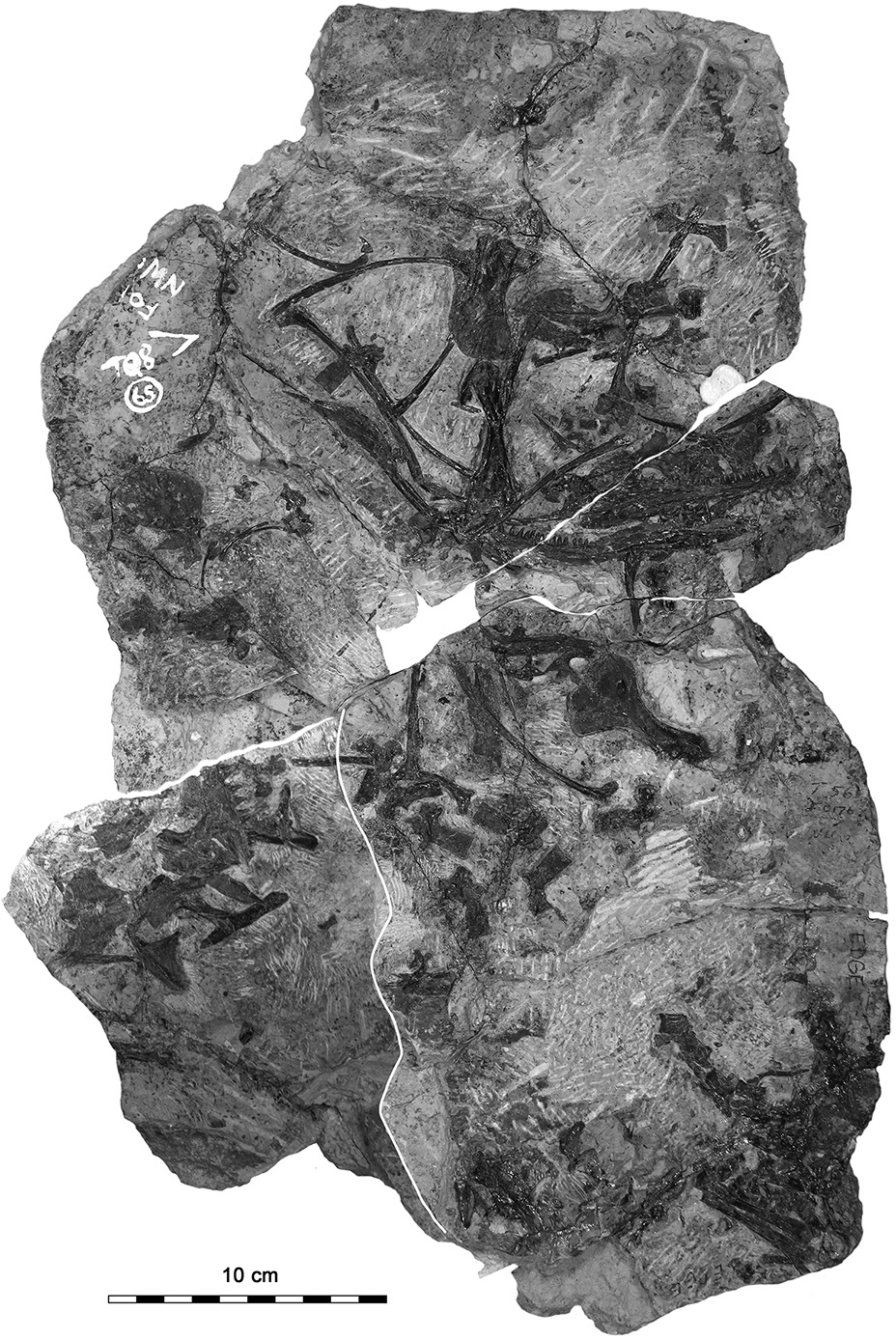 Ianthodon schultzei holotype KUVP 133735, slab in present condition, combined with photograph of skull area (lower left) before its removal.